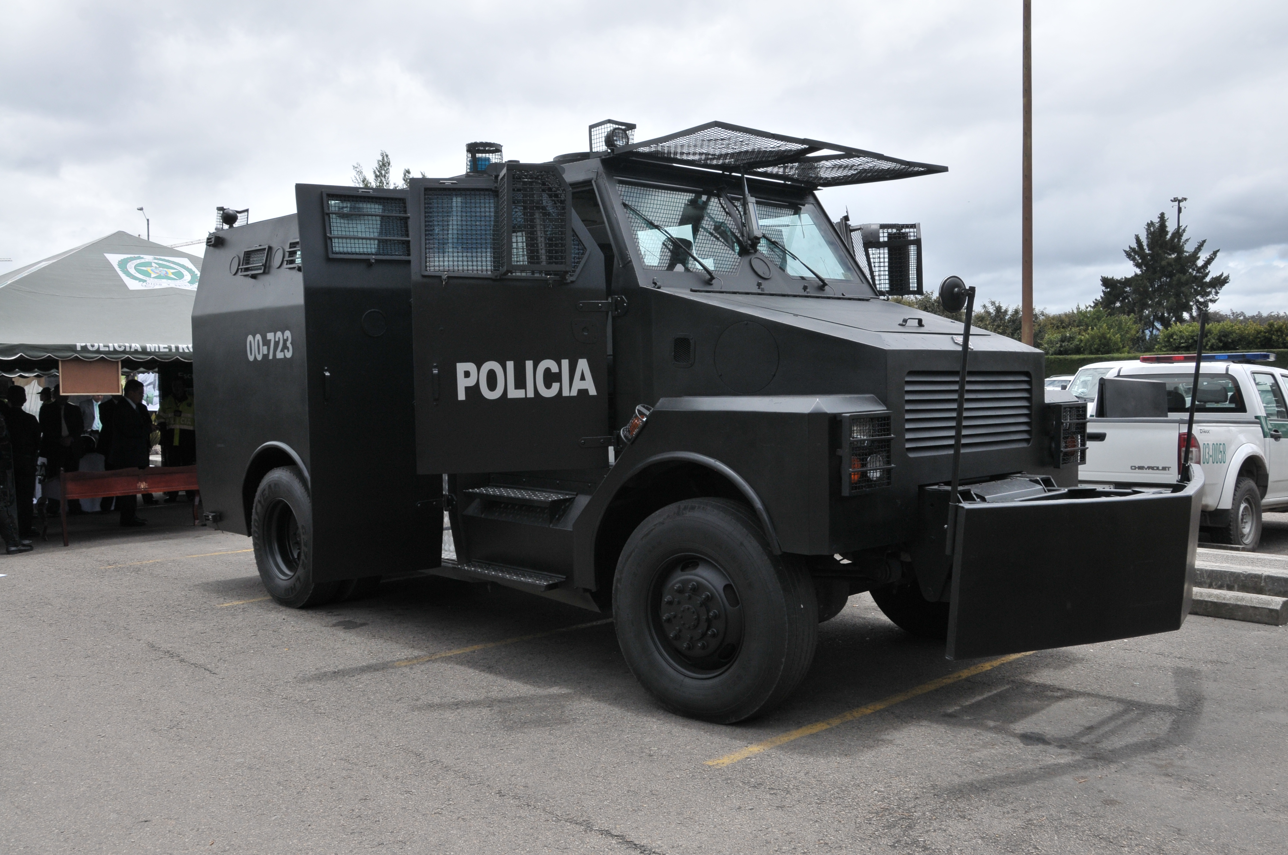 Vehículo Policía Nacional de Colombia